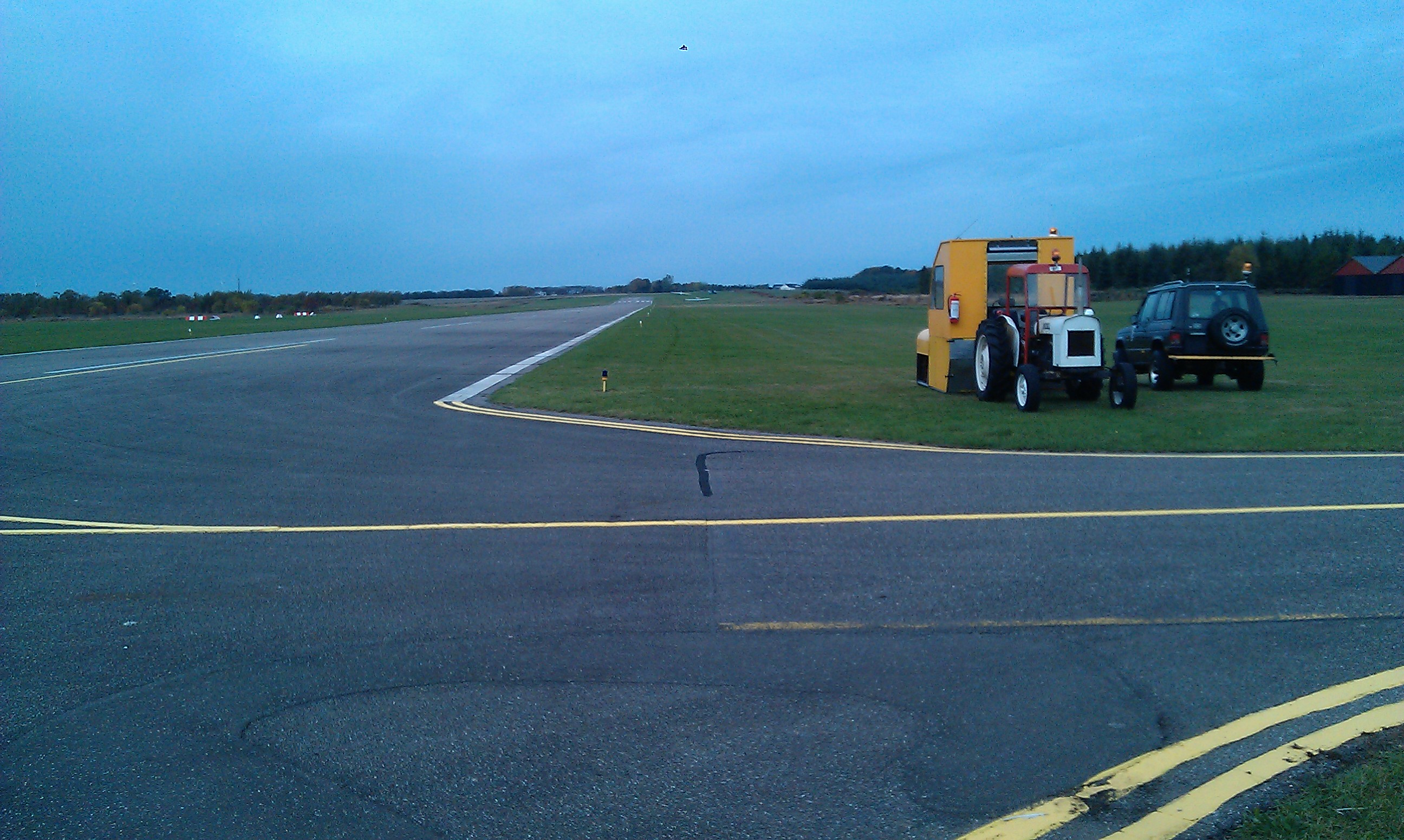 Svæveflyveklubben anvender græsset nord for banen med spillet i forgrunden.